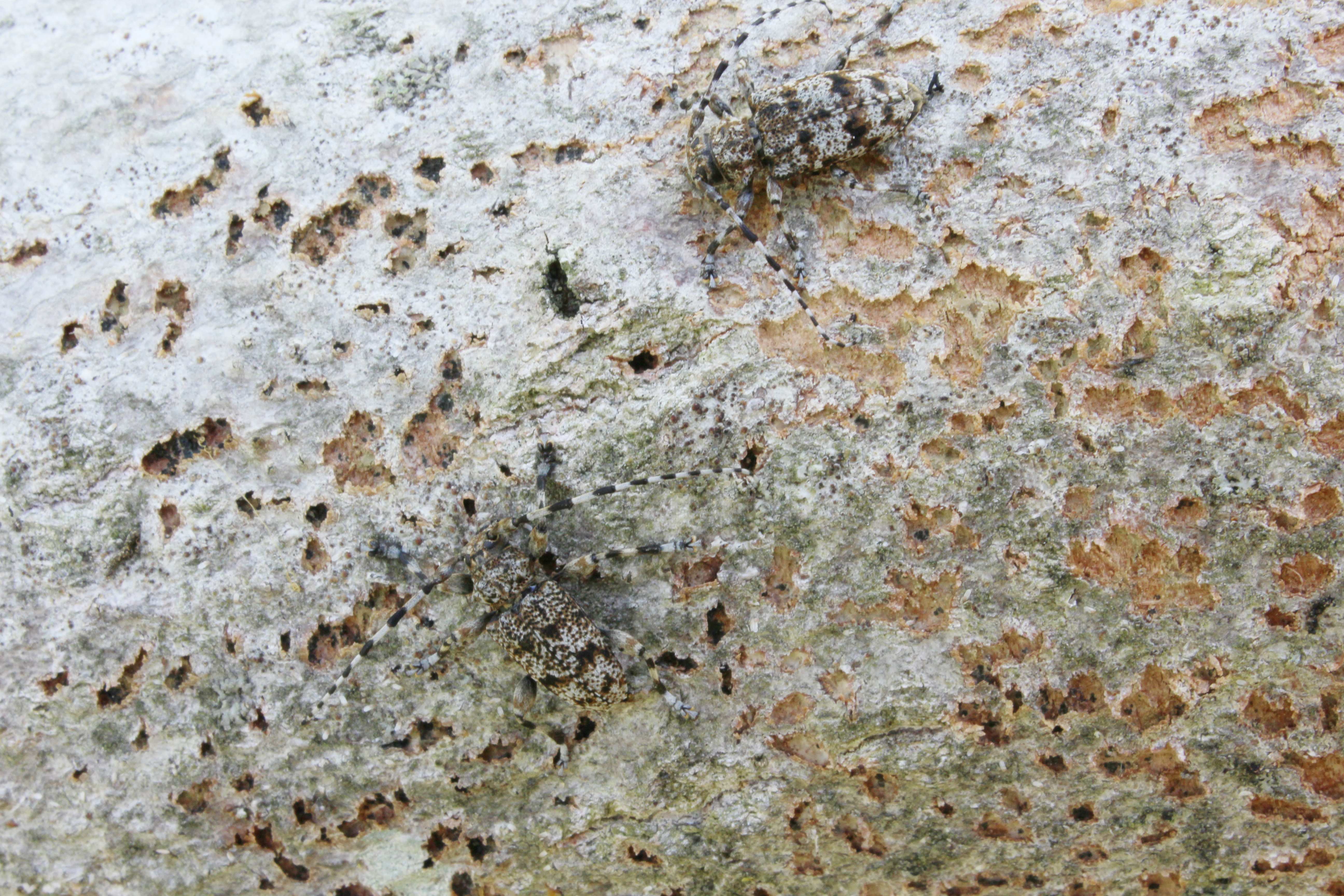 Két tarka cincér egy száraz farönkön